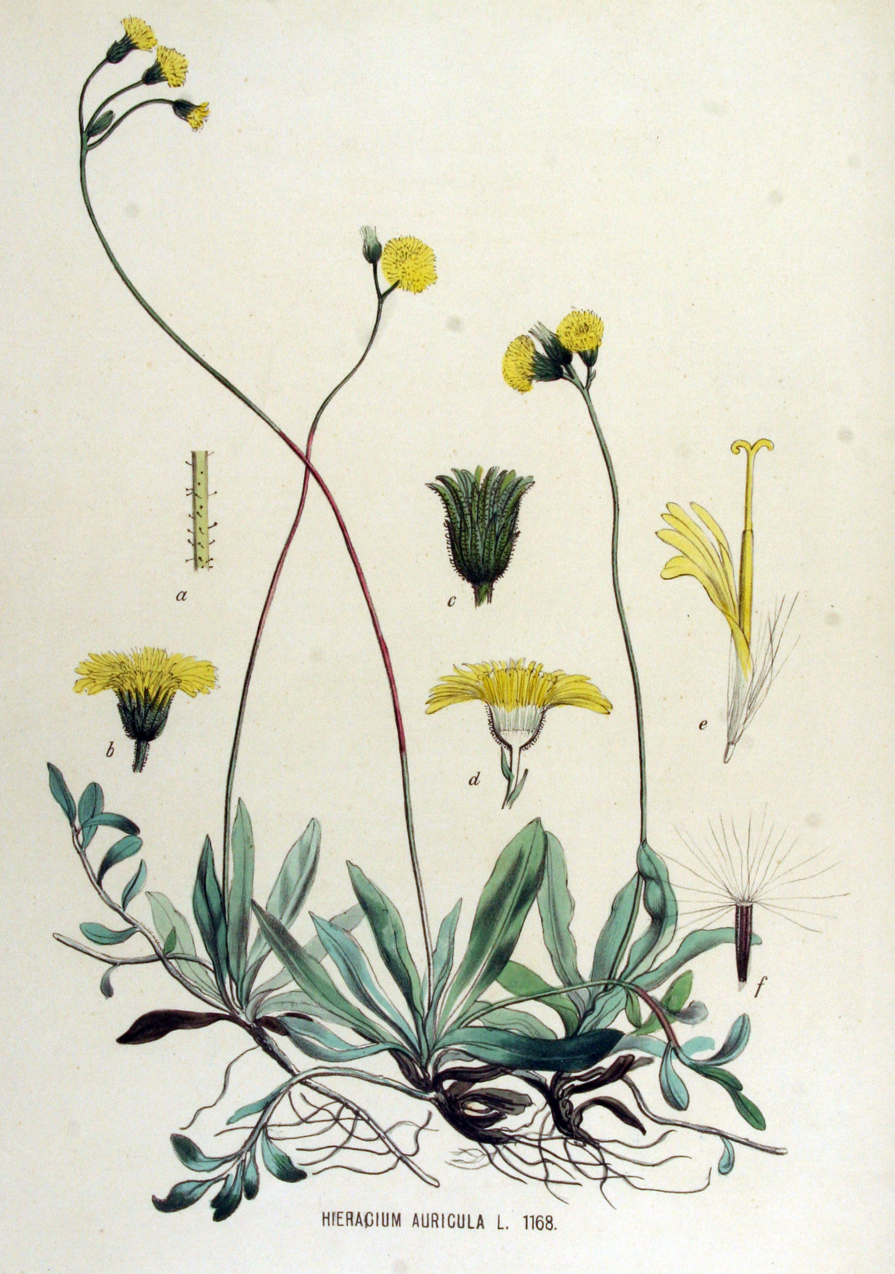 Hieracium lactucella Wallr. (Syn. Hieracium auricula auct. non L.)